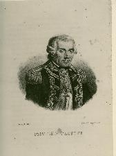 Scannerizzazione di una stampa ottocentesca di mia proprietà.